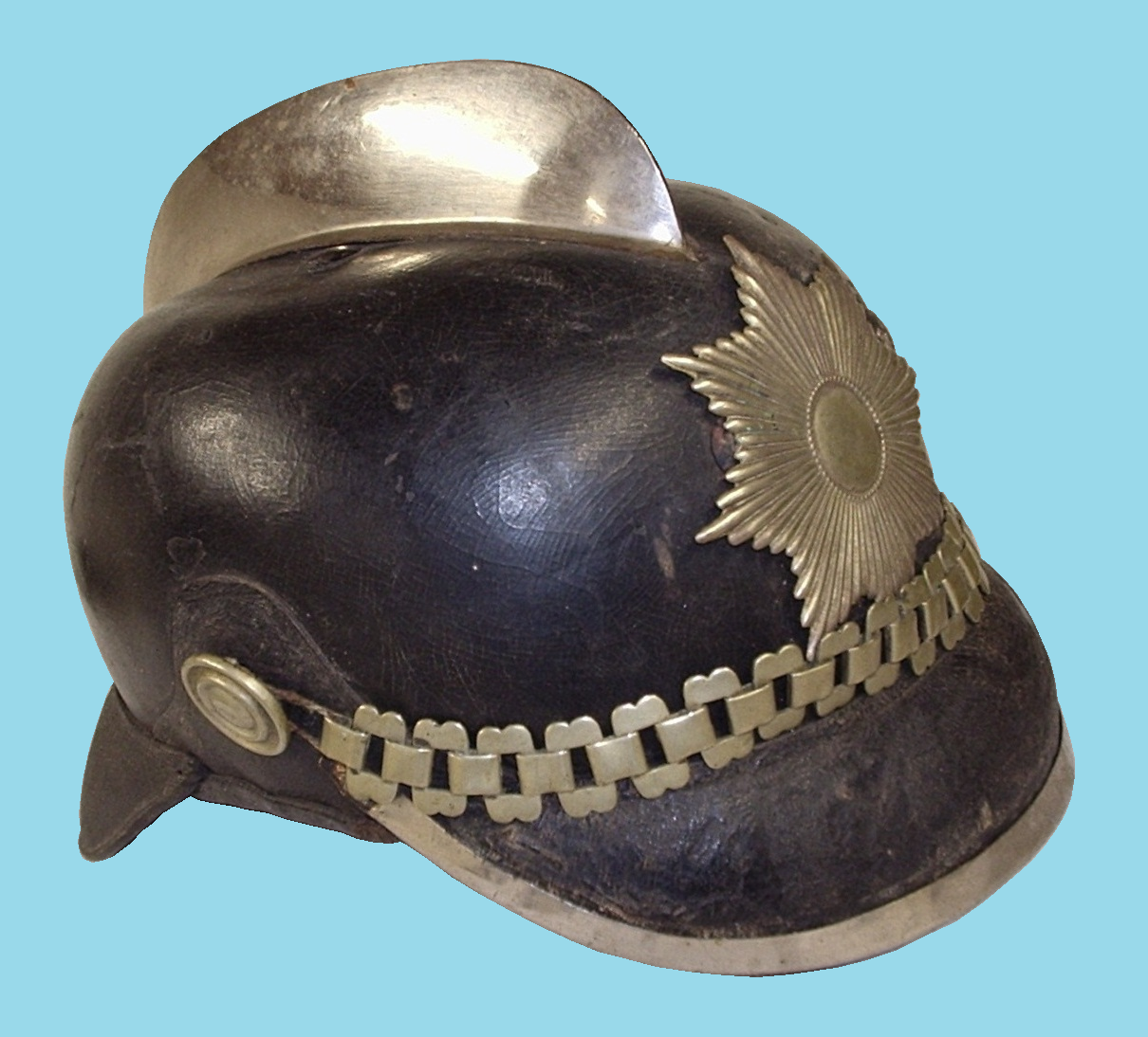 Capacete pickelhaube da antiga Sociedade Teuto-Brasileira de Bombeiros Voluntários, Curitiba, Paraná.